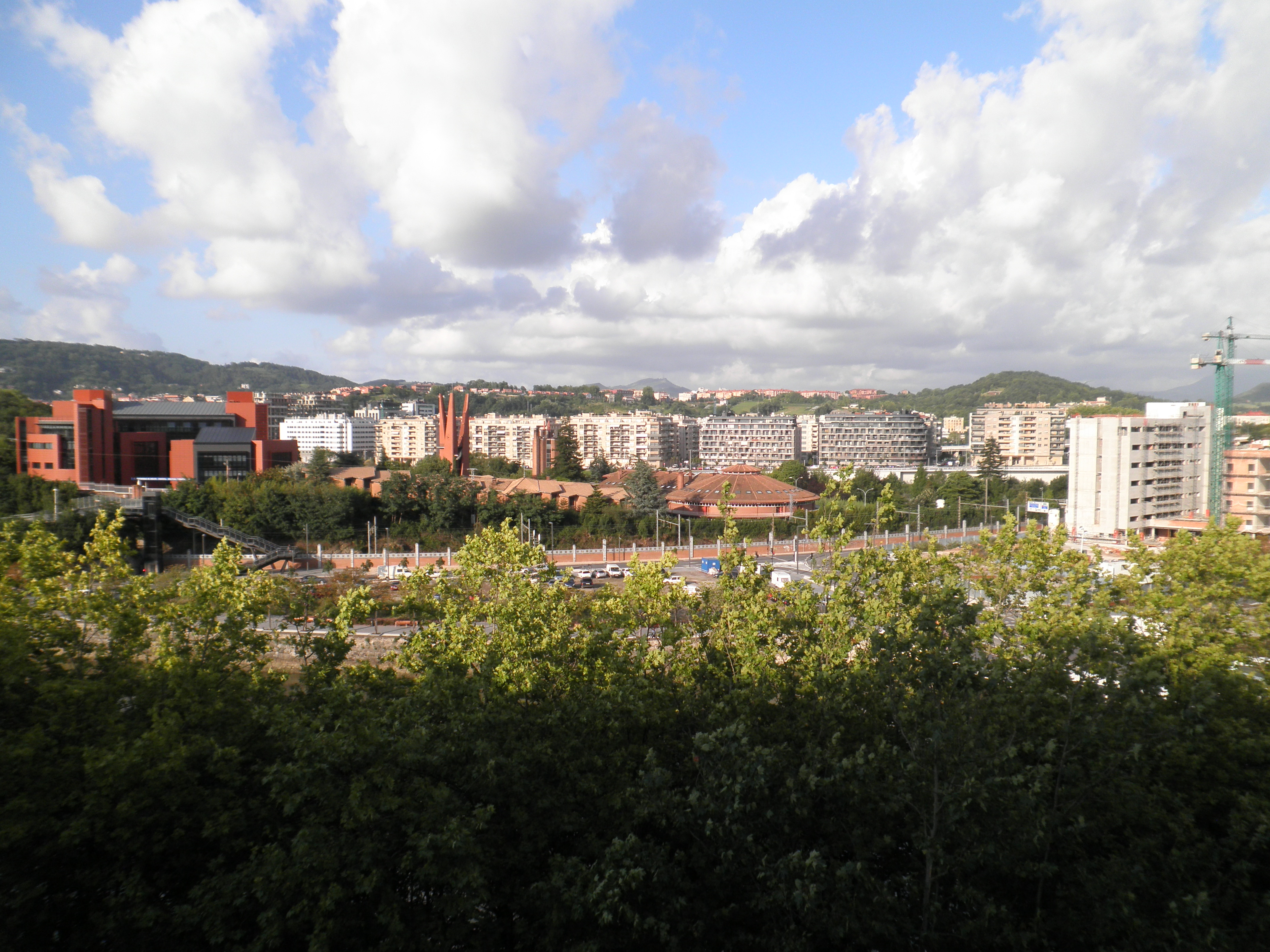 Loiollako erriberak eta Mundaiz Amaratik. Urruti, Bizkaiko pasealekua ikus daiteke.